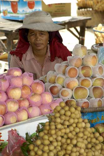 Market at Mekong ferry landing. Neak Leoung, Prey Veng Cambodia